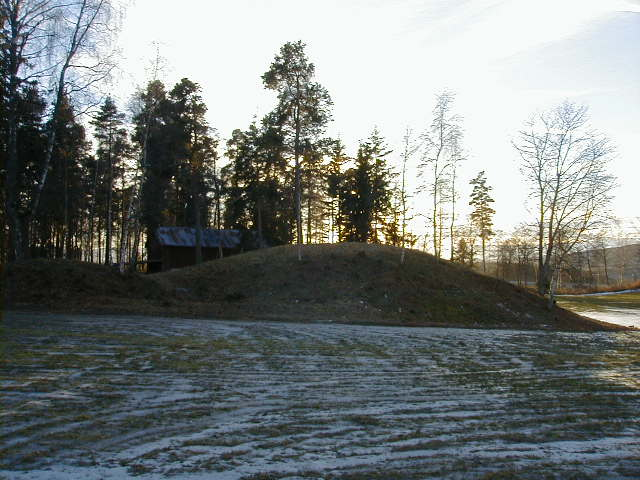 Fra Veien Kulturminnepark